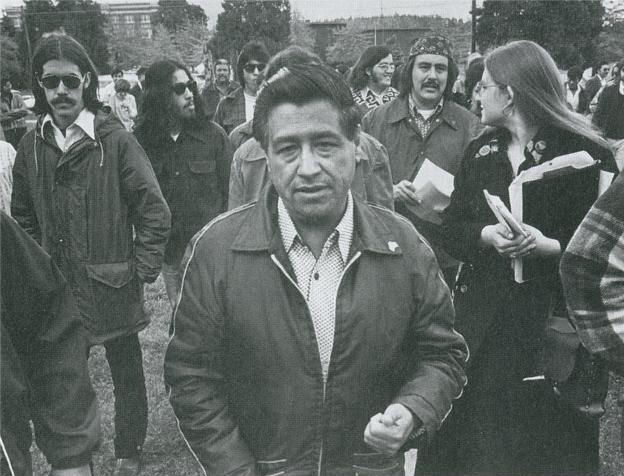 César Chávez visitas colegio César Chávez en 1974, un año después de la escuela abrió. estaba allí para mostrar su apoyo a la nueva escuela que fue nombrada en su honor.